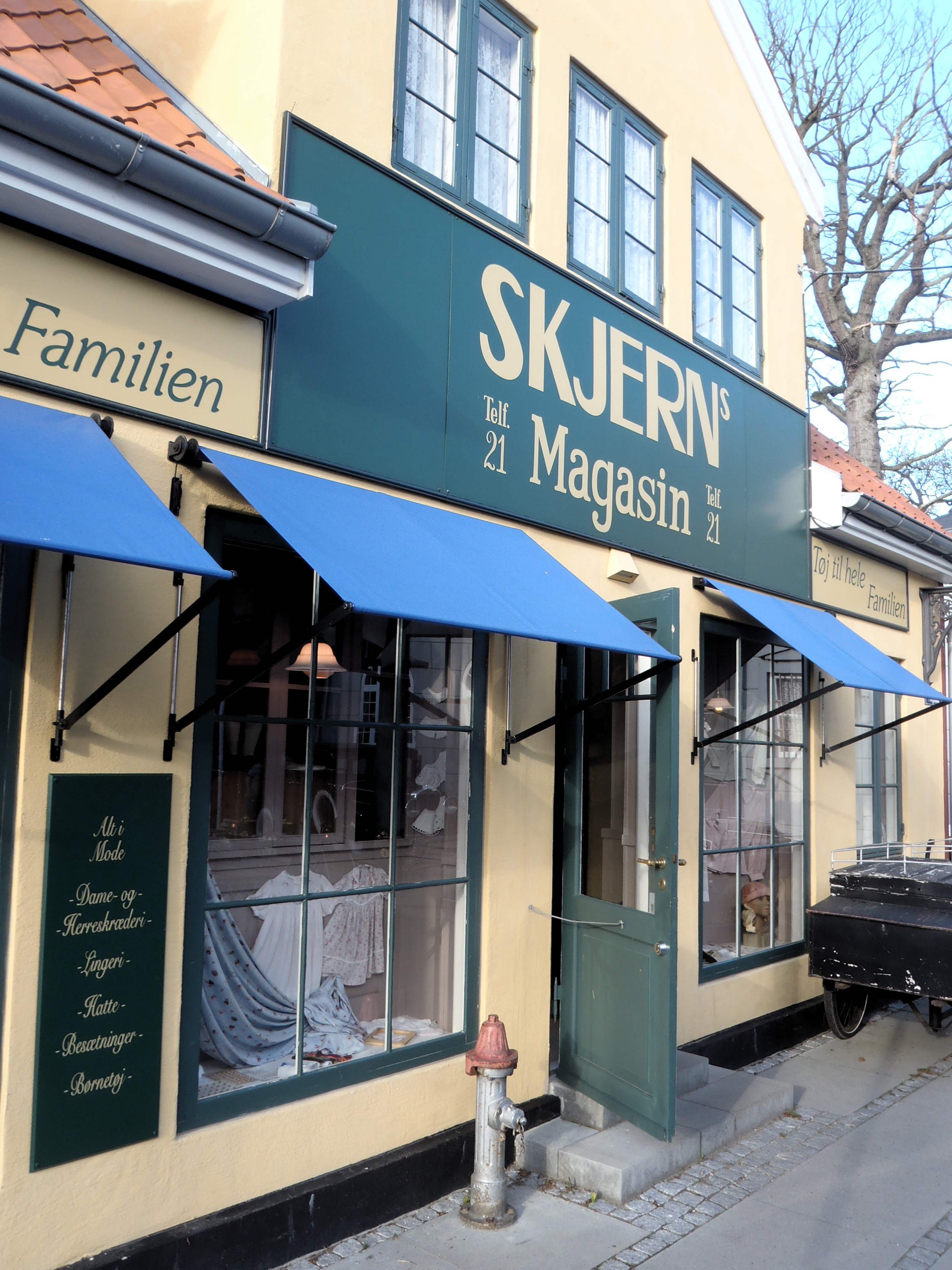 "Skjerns Magasin" på Bakken